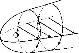 Crosstail currents